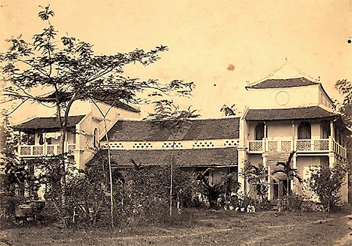 Một nhà dòng Thiên Chúa Giáo ở Hà Nội